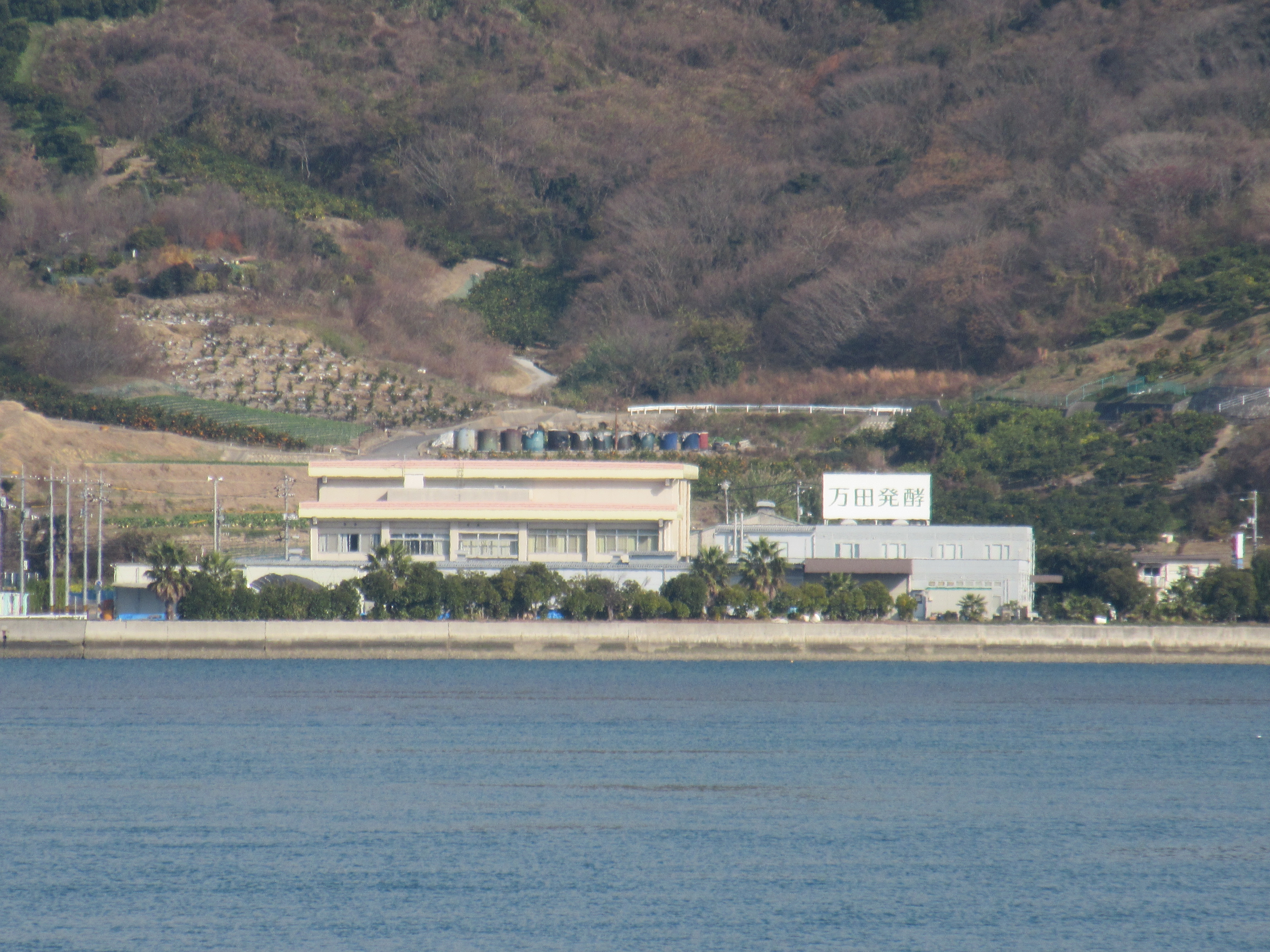 万田発酵本社